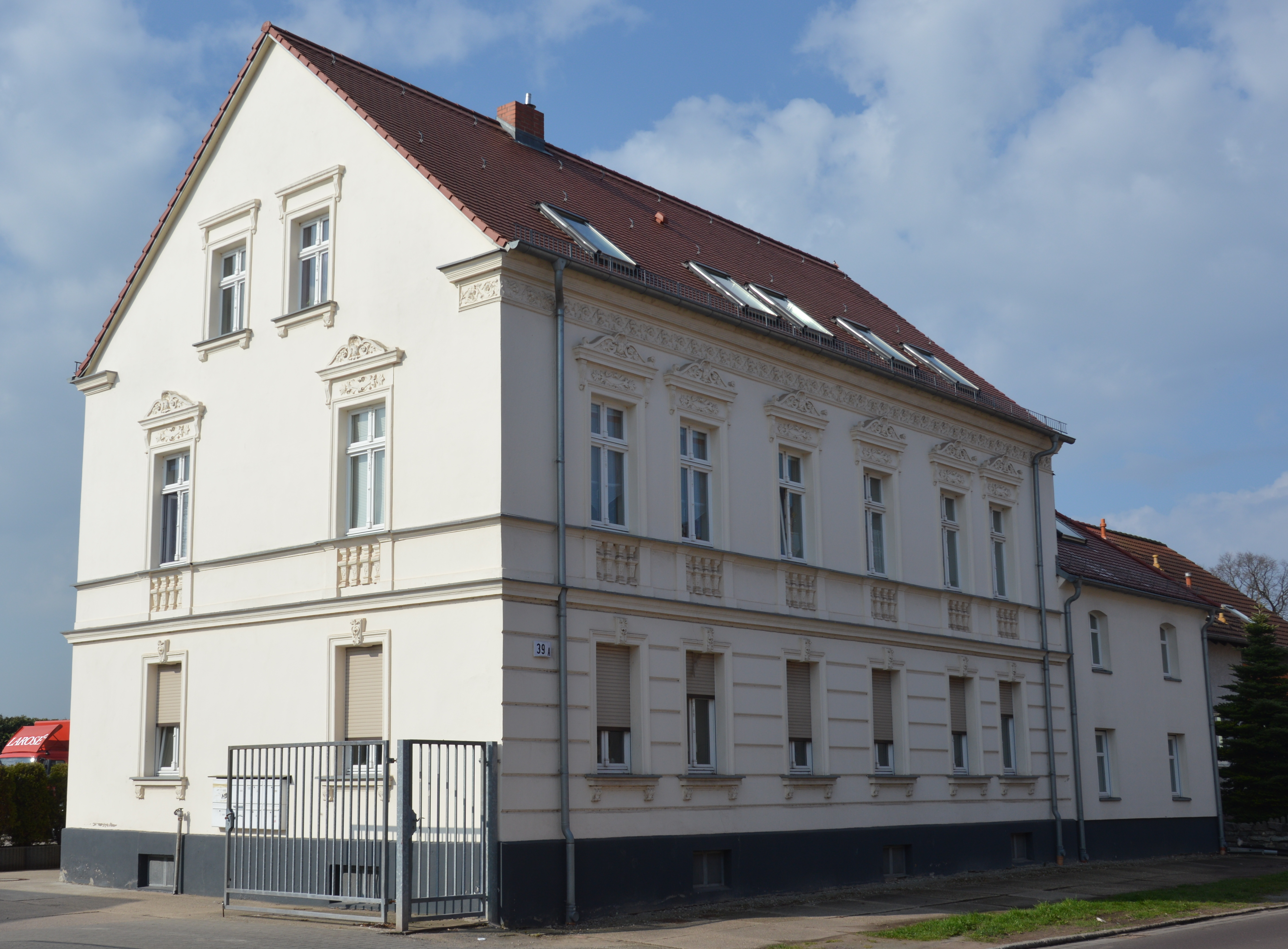 Haus Helmstedter Chaussee 39a in Magdeburg